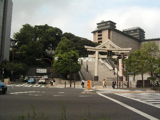 2004年(平成16年)8月5日に投稿者が撮影したものです。Stanislaus 2005年3月28日 (月) 11:32 (UTC) category:神社の画像